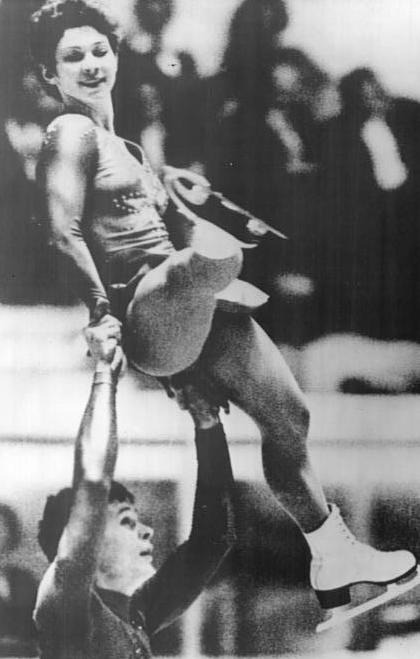 Irina Wrobjewa, Igor Lissowski ADN-ZB Tele-27.10.79 Japan: Internationaler Eiskunstlauf-Wettbewerb. Bei den Paaren und im Eistanzen waren mit Irina Wrobjewa - Igor Lissowski (unser Foto) bzw. Irina Heissejewa - Andrej Minskow jeweils die sowjetischen WM-Britten dieses Jahres in Tokio erfolgreich.